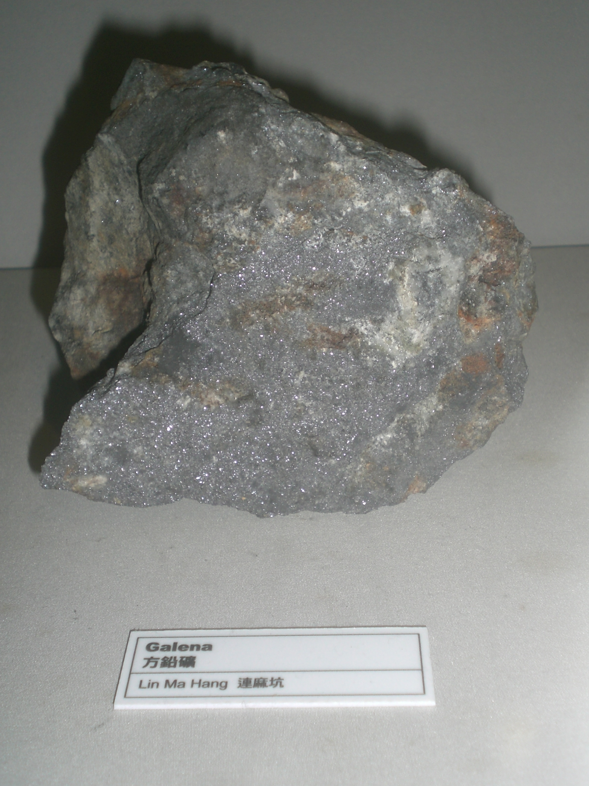 中文（香港）: 香港大學許士芬地質博物館收藏蓮麻坑產方鉛礦。